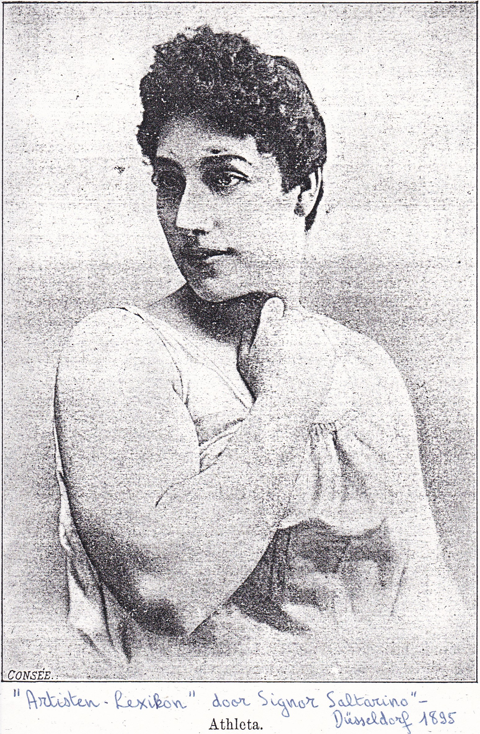 Miss Athléta (1895) in de artisten lexikon, Hermann Waldemar Otto (1863-1941) pseudoniem Signor Saltarino